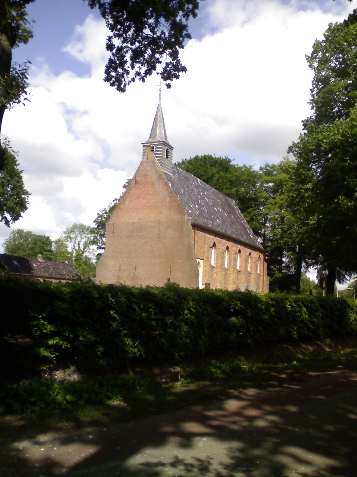 Tsjerke fan Aldwâld (Church in the village Oudwoude)